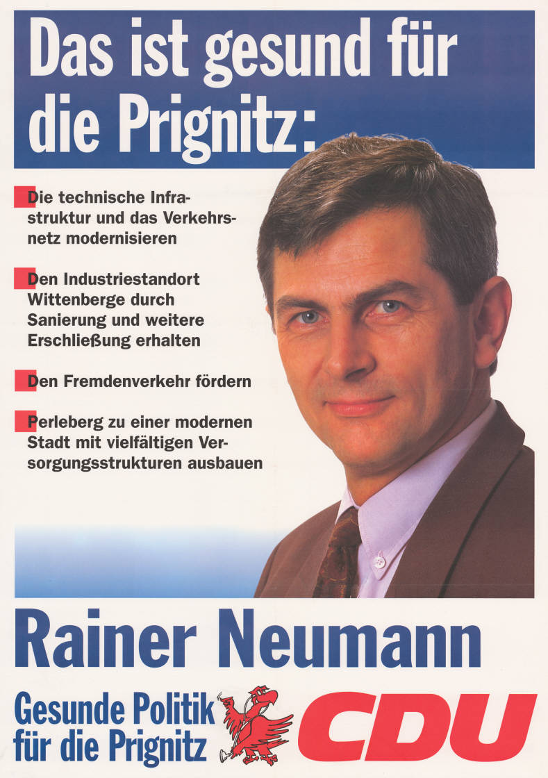 Das ist gesund für die Prignitz: . Die technische Infrastruktur und das Verkehrsnetz modernisieren . Den Industriestandort Wittenberge durch Sanierung und weitere Erschließung erhalten . Den Fremdenverkehr fördern . Perleberg zu einer modernen Stadt mit vielfältigen Versorgungsstrukturen ausbauen Rainer Neumann Gesunde Politik für die Prignitz CDU Abbildung: Porträtfoto Plakatart: Kandidaten-/Personenplakat mit Porträt Objekt-Signatur: 10-033 : 239 Bestand: Landtagswahlplakate Brandenburg (10-033) GliederungBestand10-18: Landtagswahlplakate Brandenburg (10-033) » CDU Lizenz: KAS/ACDP 10-033 : 239 CC-BY-SA 3.0 DE